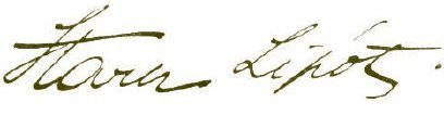 Stark Lipót aláírása.